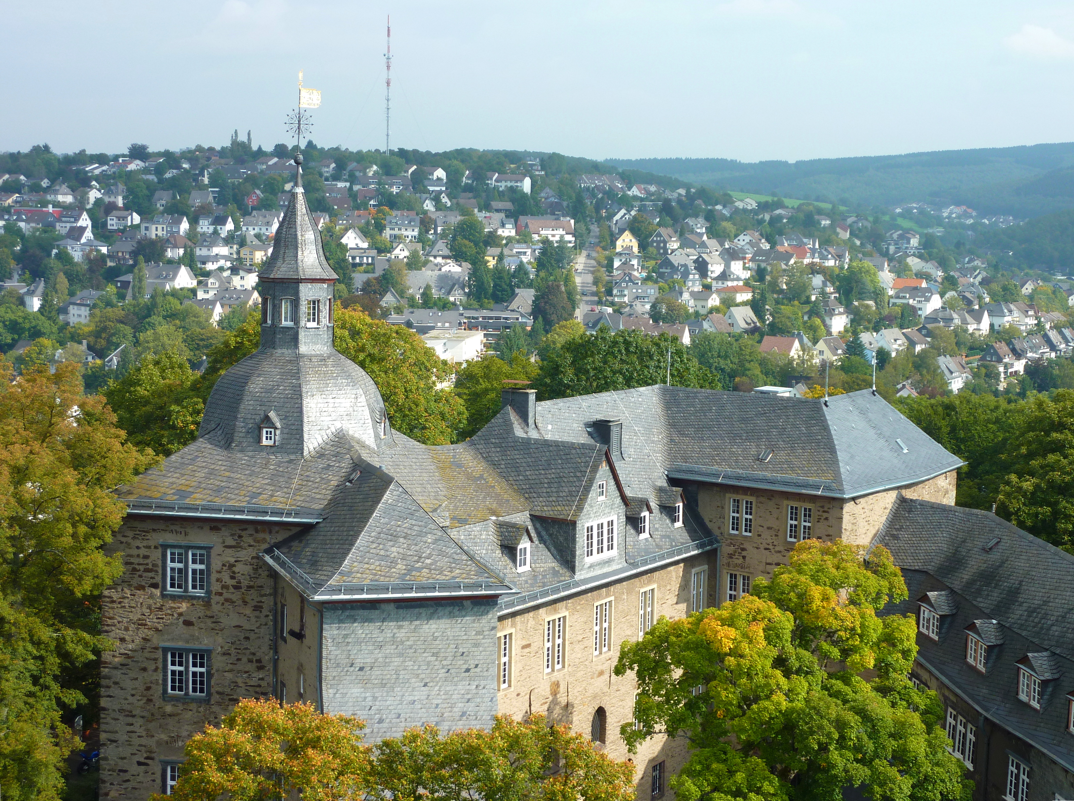 Oberes Schloss in Siegen/Westfalen: Ansicht der Gebäude der Kernburg von Südwesten; im Hintergrund der Giersberg.